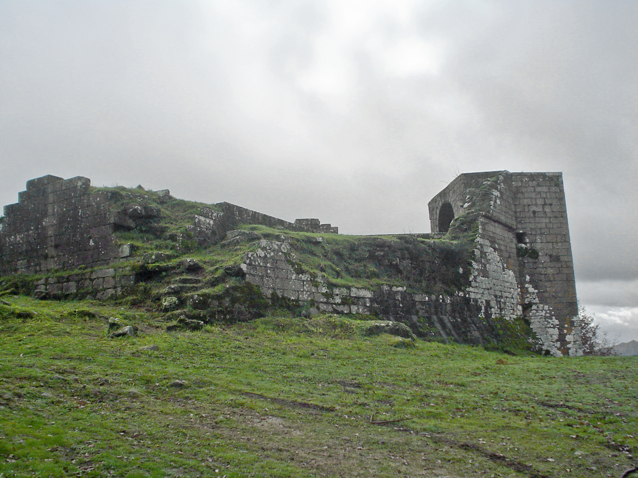 Torres de Altamira. Parede do Palacio